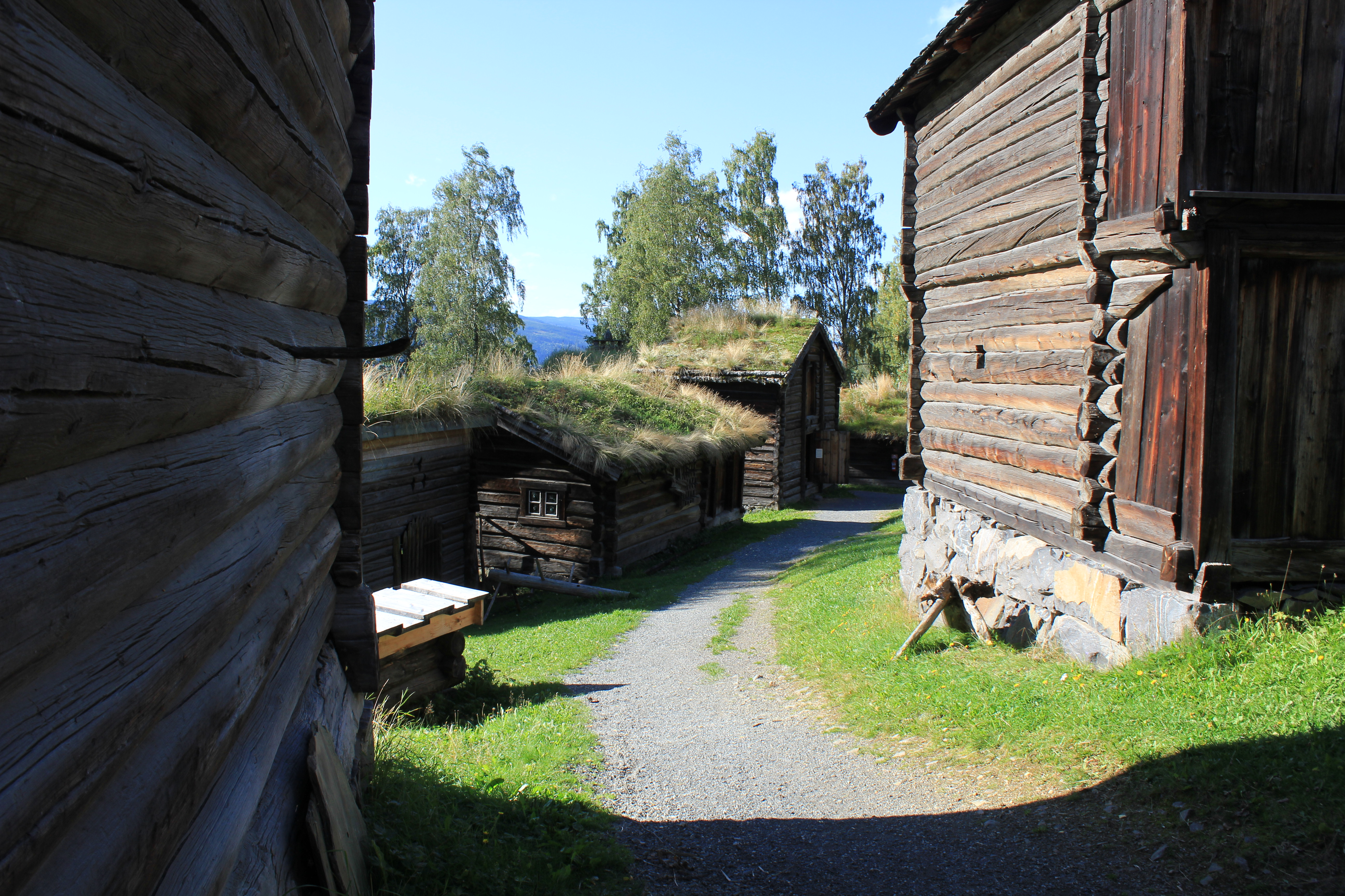 Utsnitt fra Maihaugen.